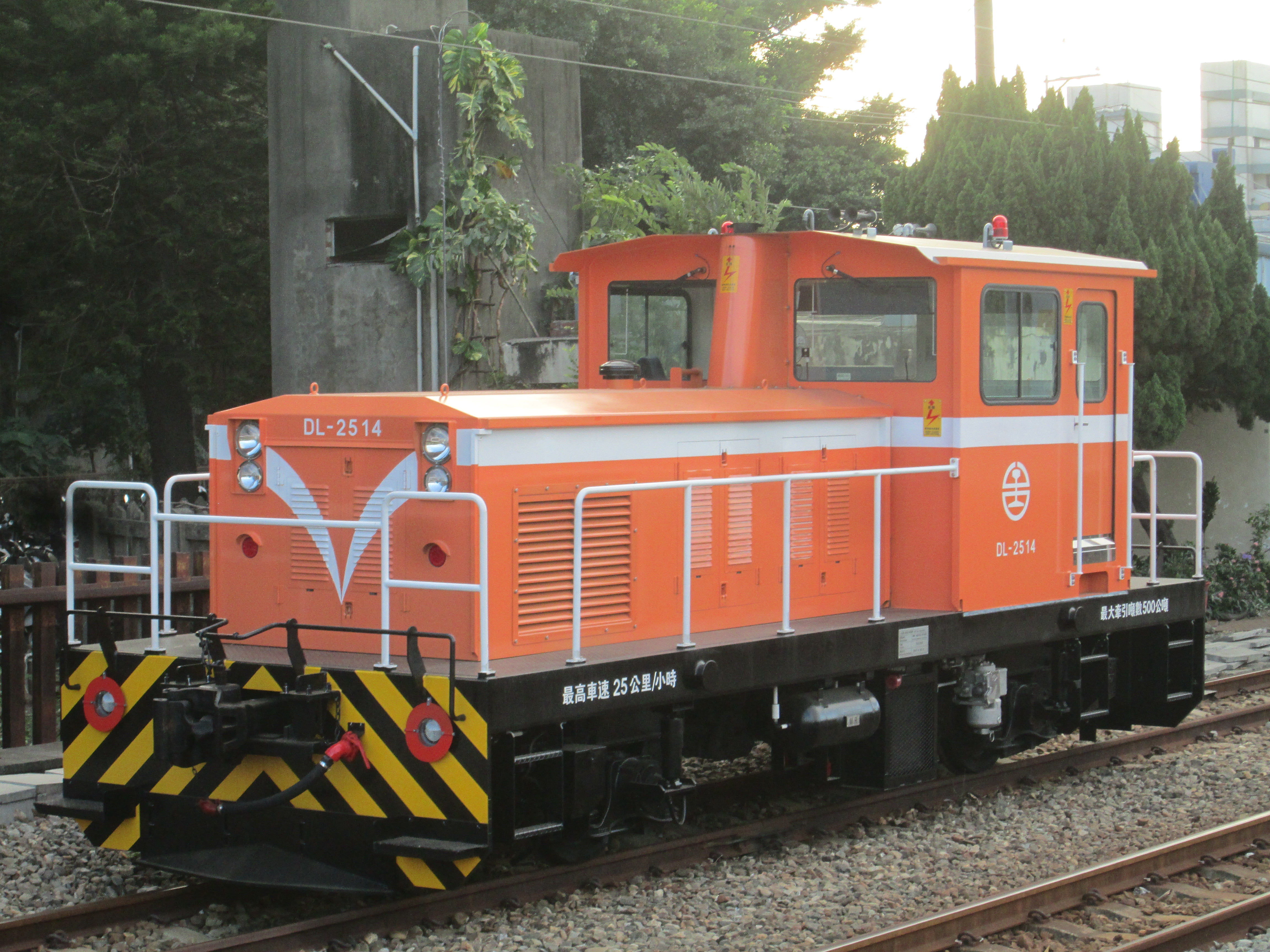 臺灣鐵路管理局調動機DL-2514於成功車站。